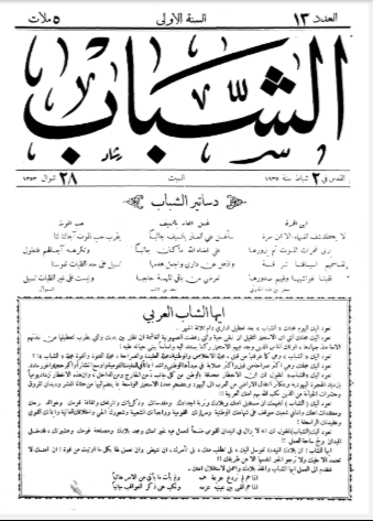 مجلة أسبوعية فلسطينية كانت تصدر في القدس